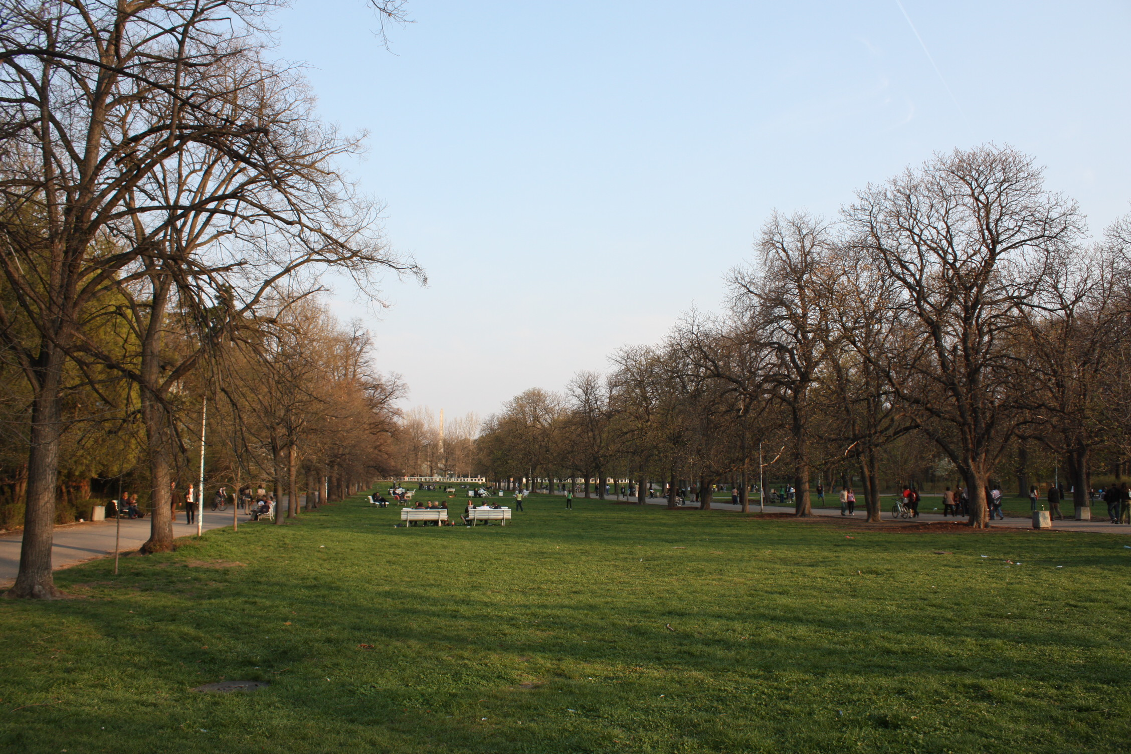 Borisova gradina, Борисова градина, Bulgaria